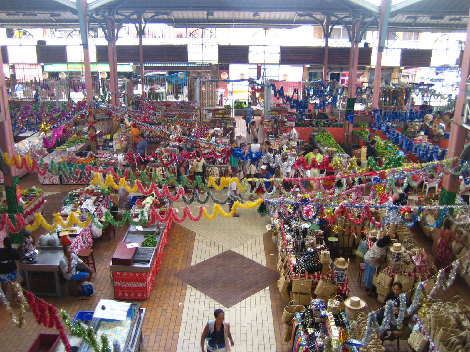 Marché de Papeete (Photo personnel 2006) Utilisateur:FRED